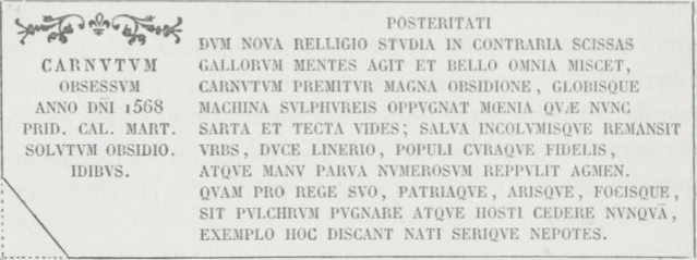 épitaphe en latin enchassée sur un pan de muraille en mémoire de la brèche causée lors du siège de 1568.